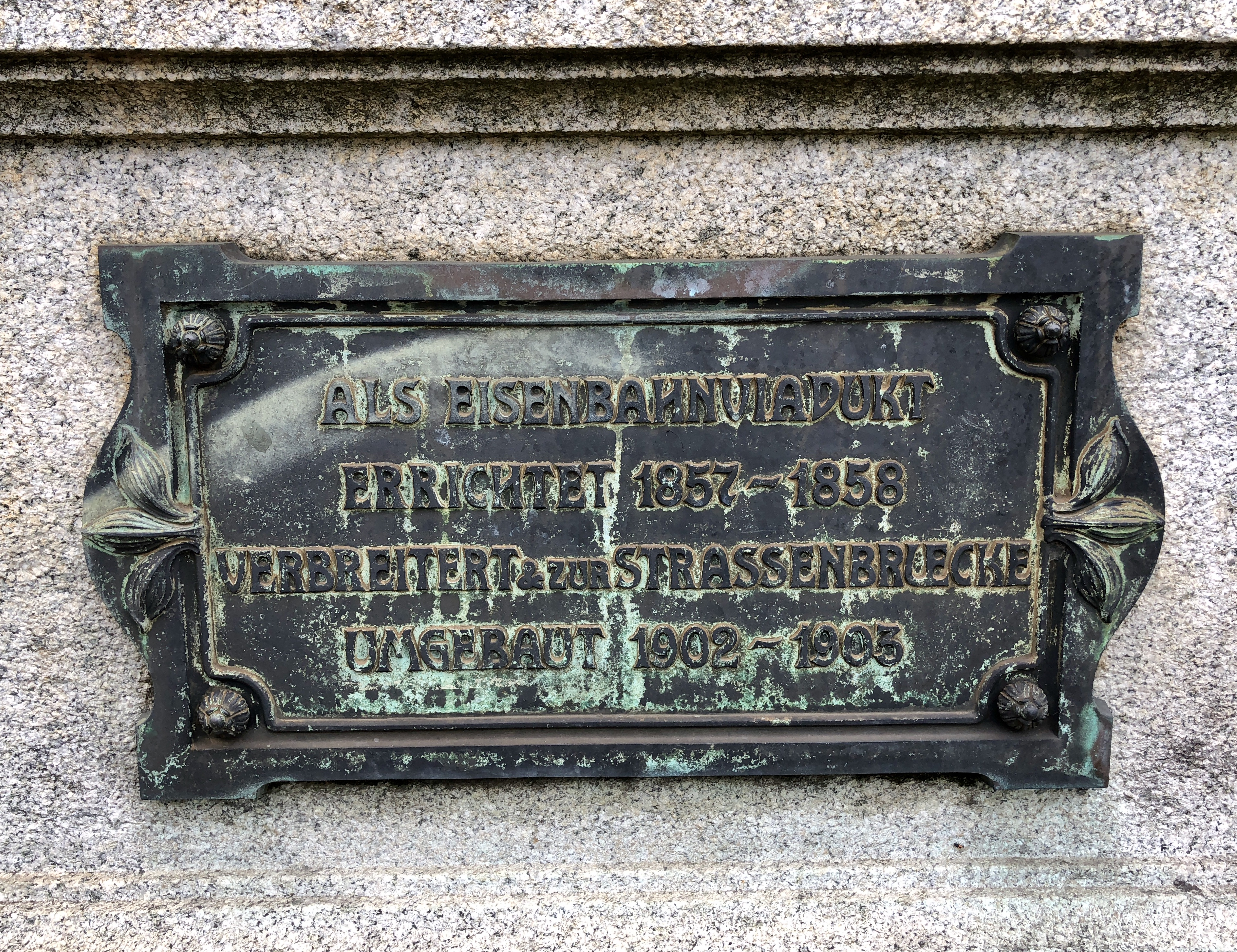 Eine Gedenktafel, angebracht am südlichen Ende des Viadukts, erinnert an die Bauzeit des ursprünglichen Eisenbahnviaduktes von 1857 bis 1858 und an die Verbreiterung zur Strassenbrücke von 1902 bis 1903.